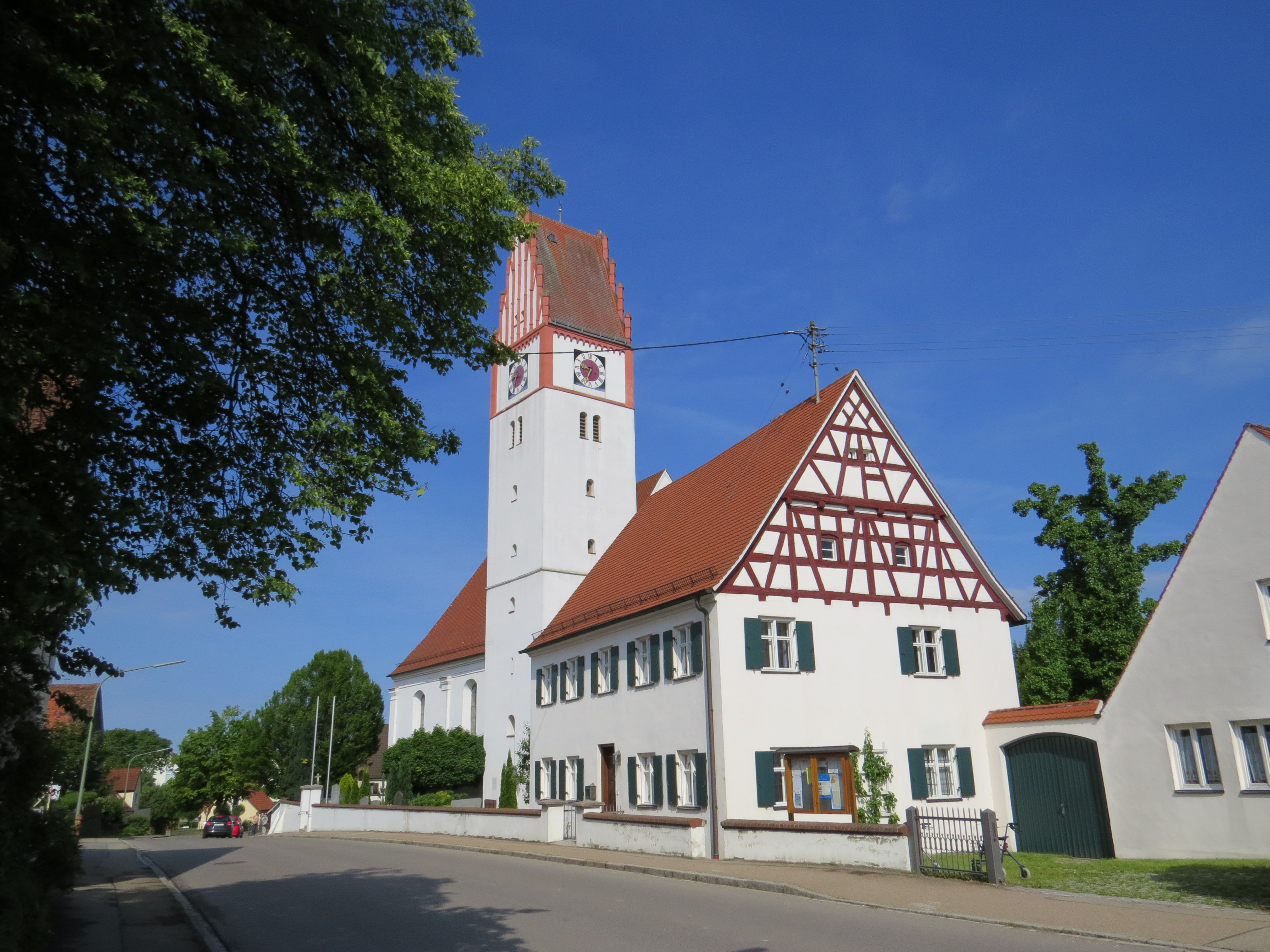 Pfarrhaus und Kirche in Bubesheim